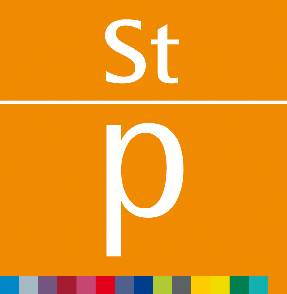 Logo des Staatspreises für Innovation des österreichischen Bundesministeriums für Wirtschaft, Familie und Jugend